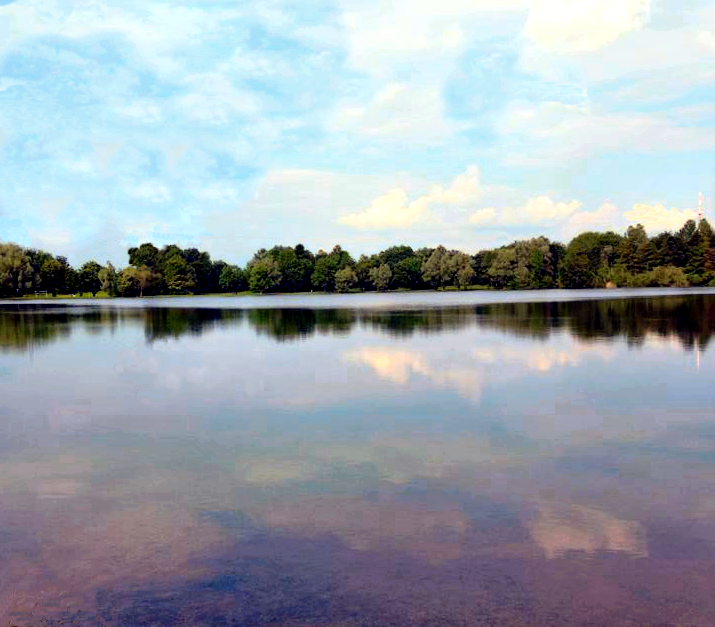 Unterschleißheimer See 2013